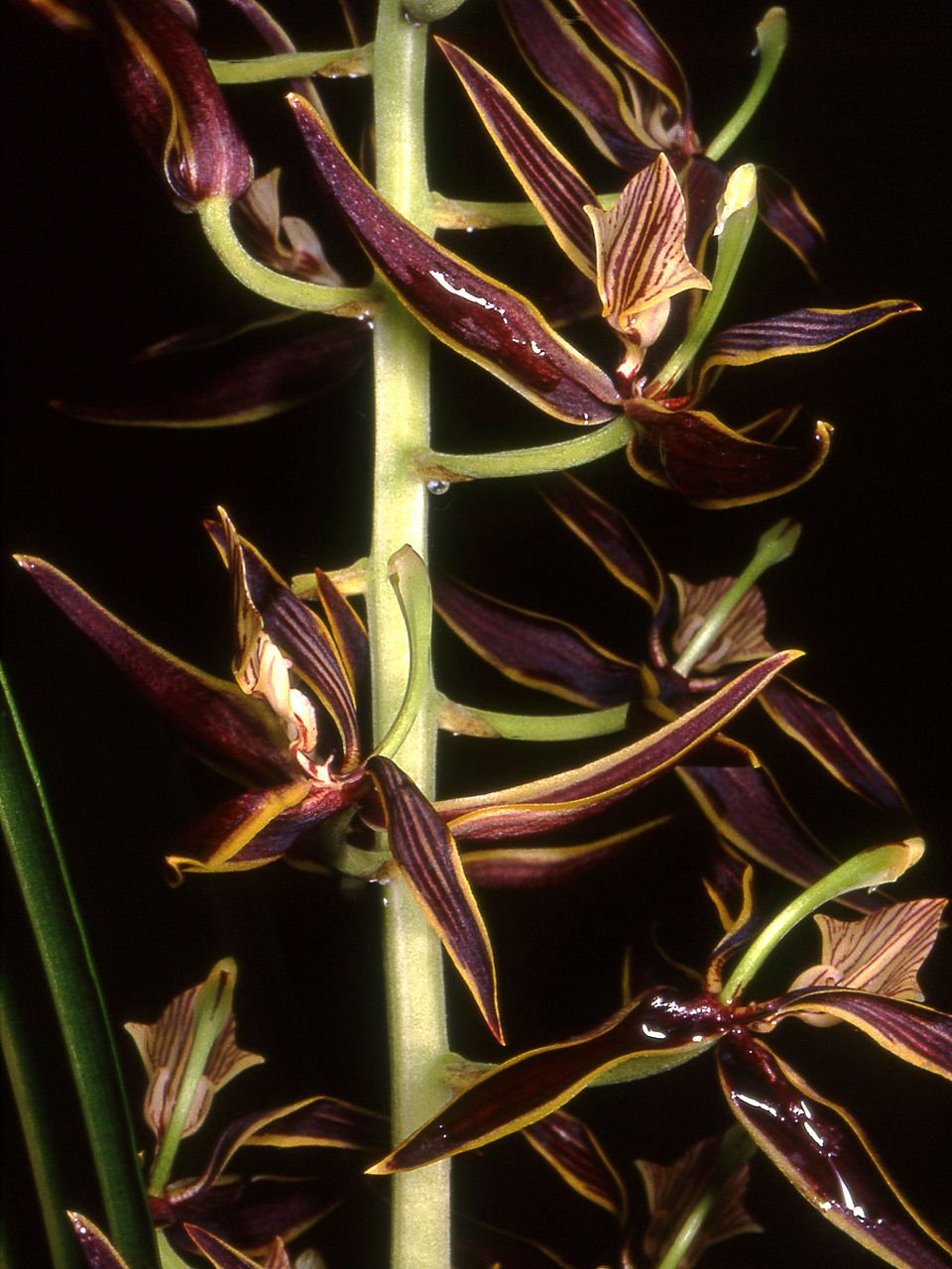 Braemia vittata